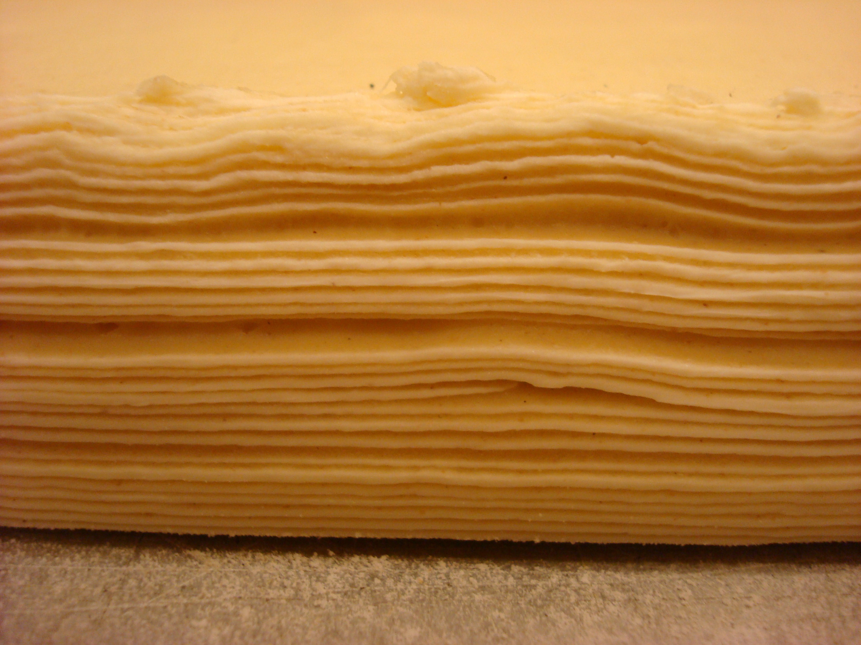 Wienerdej med 27 rullelag.